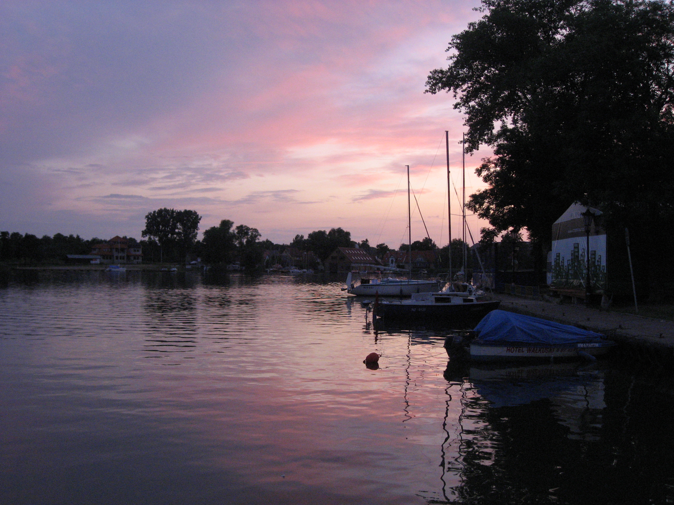 Sunset in Mikołajki, Poland.